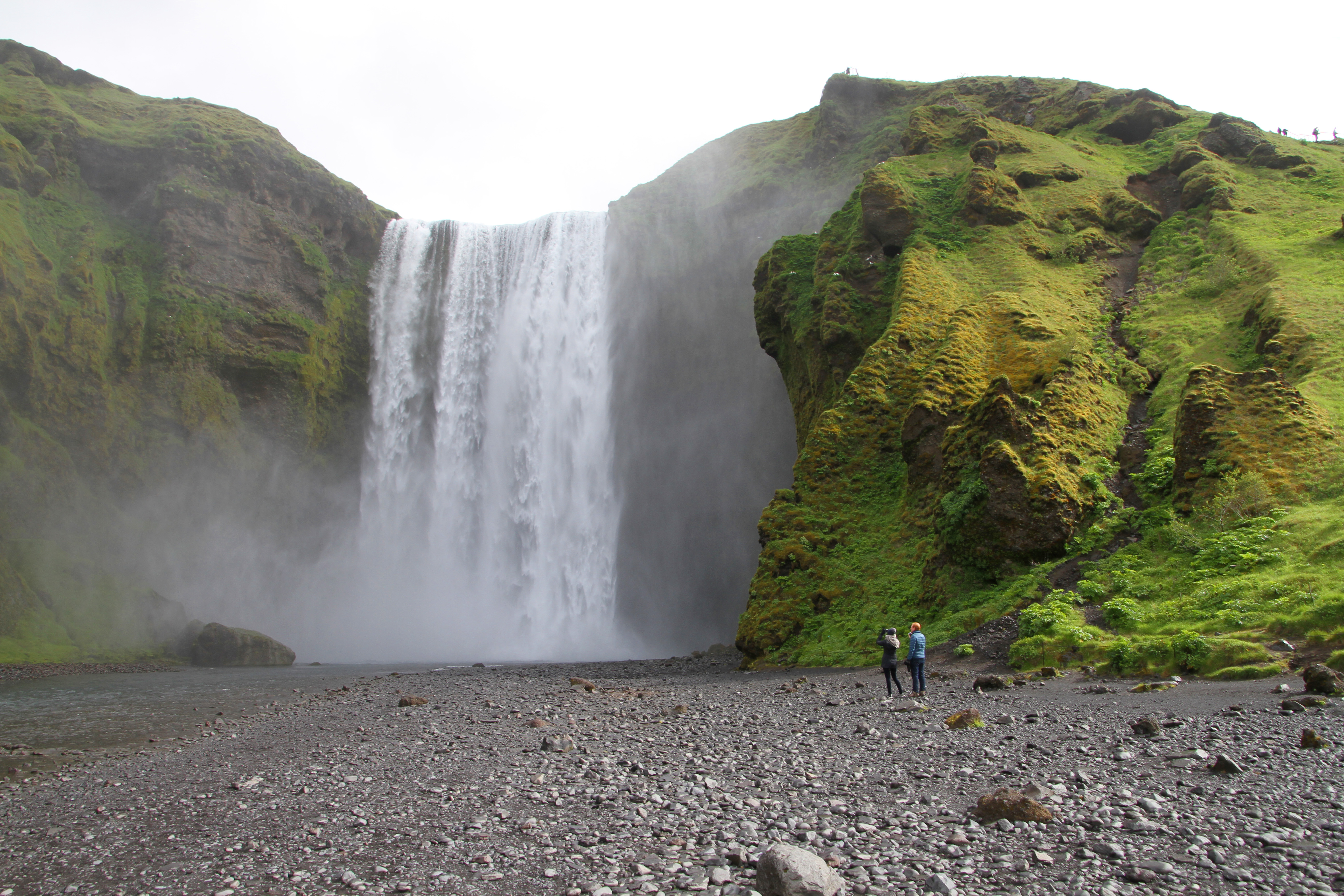 Skógafoss